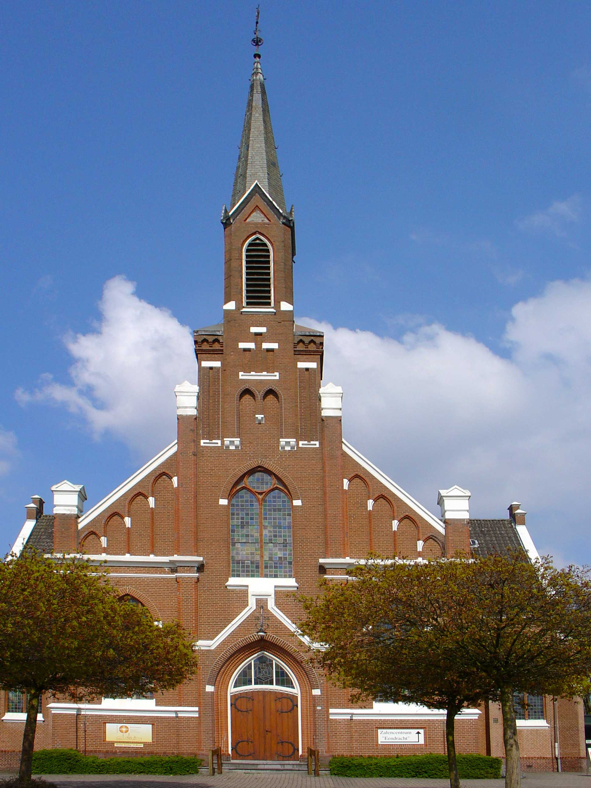 Gereformeerde kerk (PKN-kerk), rijksmonument Stadskanaal